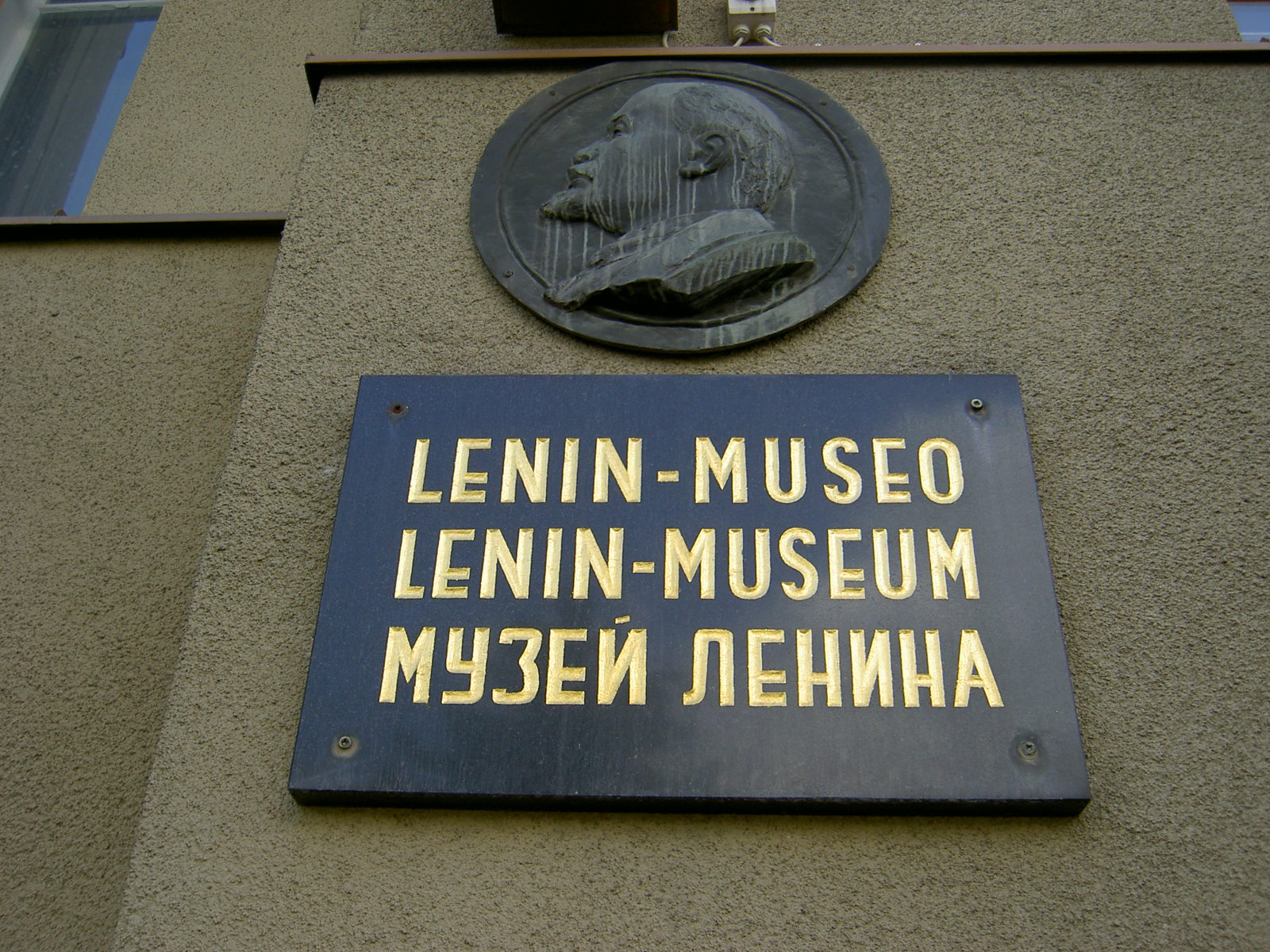 Lenin-museum in Tampere, Finland.